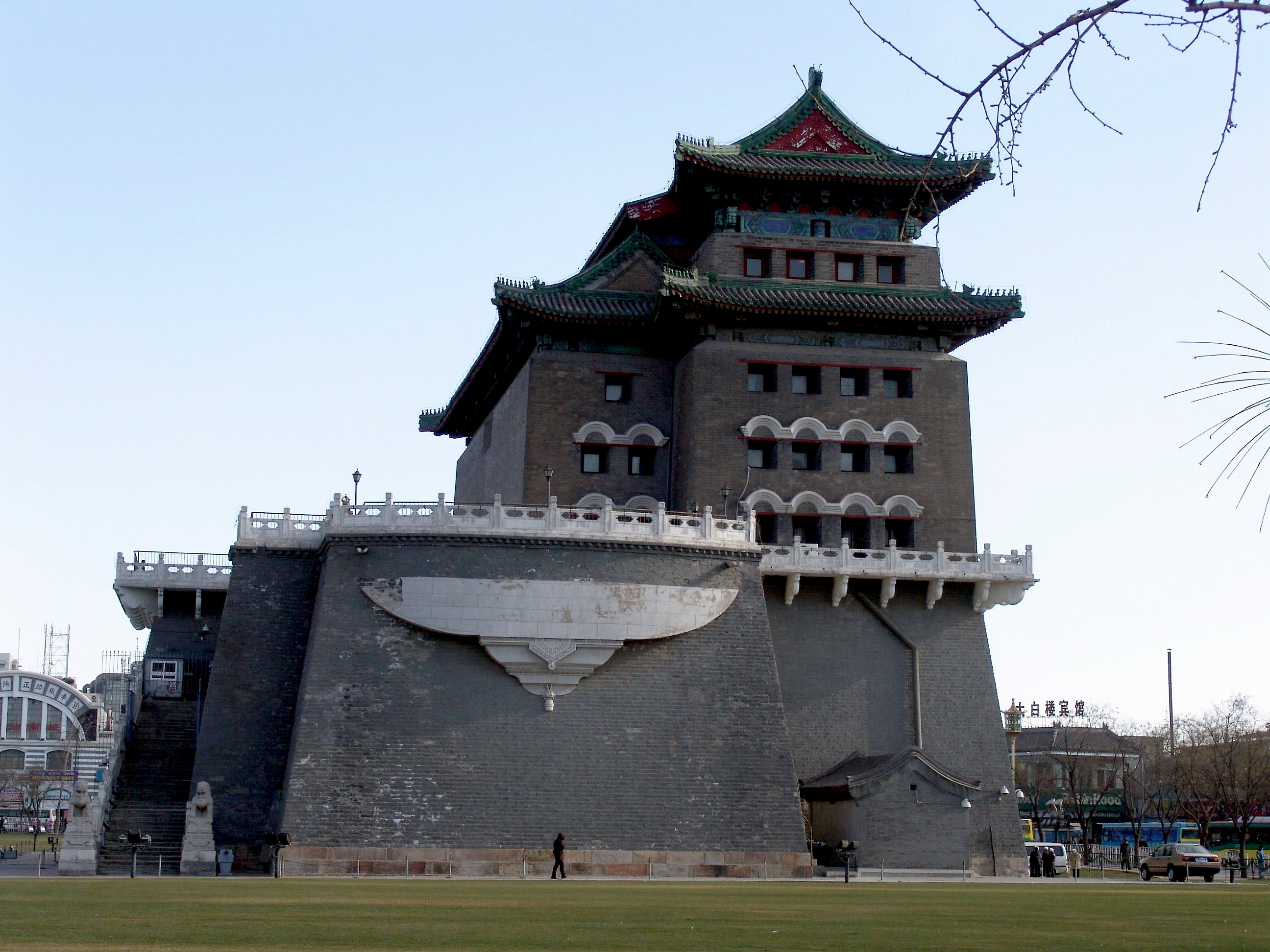 Qianmen Gate 前门城楼